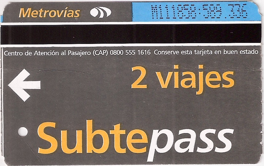 Tarjeta Subtepass para dos viajes